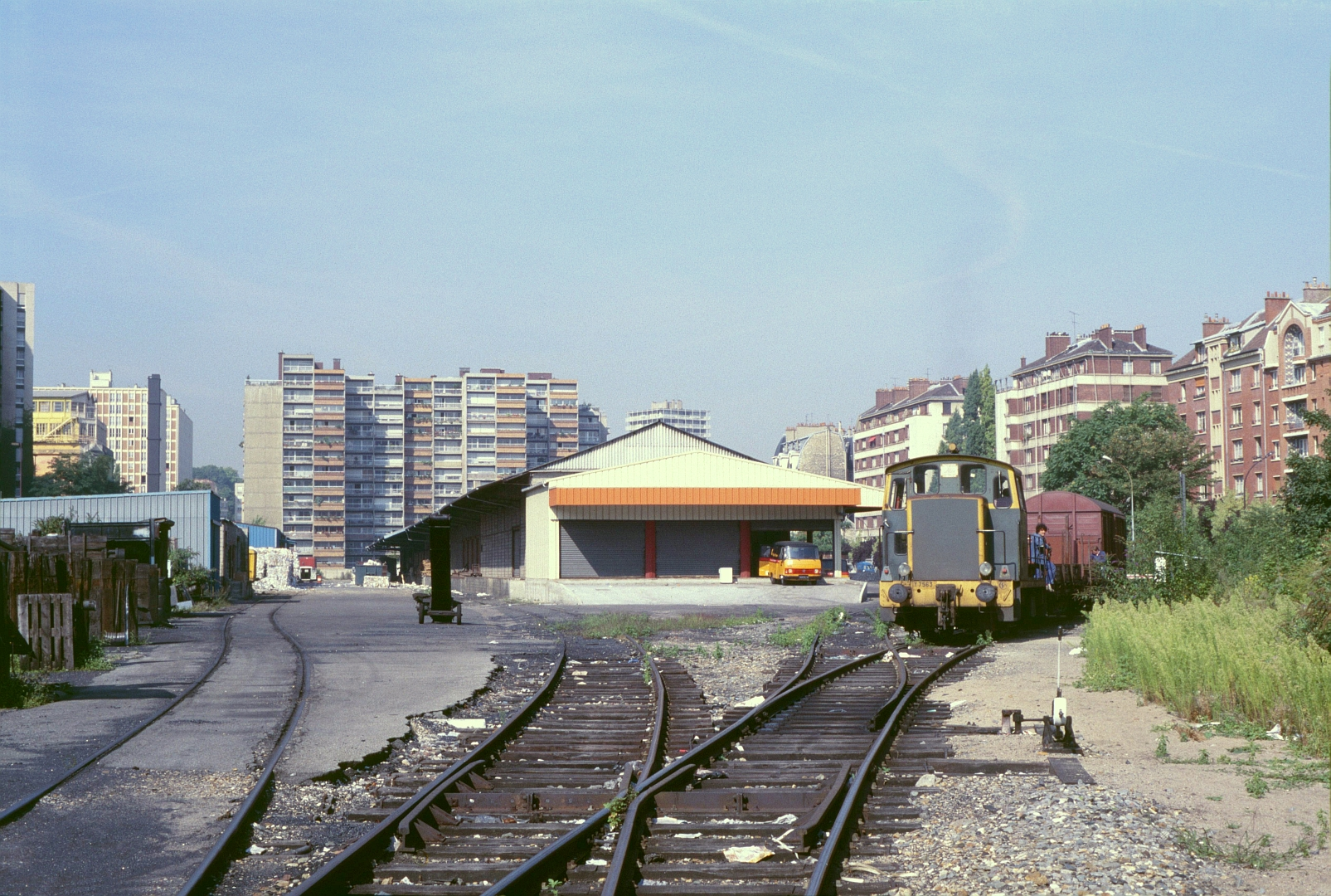 Un train de desserte marchandises en gare de la Glacière-Gentilly, sur la Petite Ceinture de Paris.